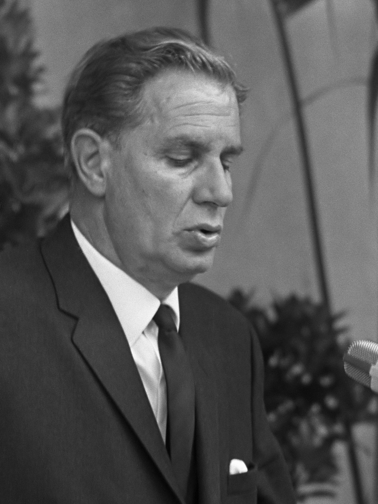 Opening van een entrepot-gebouw op Schiphol; directeur Schiphol Mr. J.C.H.A. van Stapele houdt een toespraak